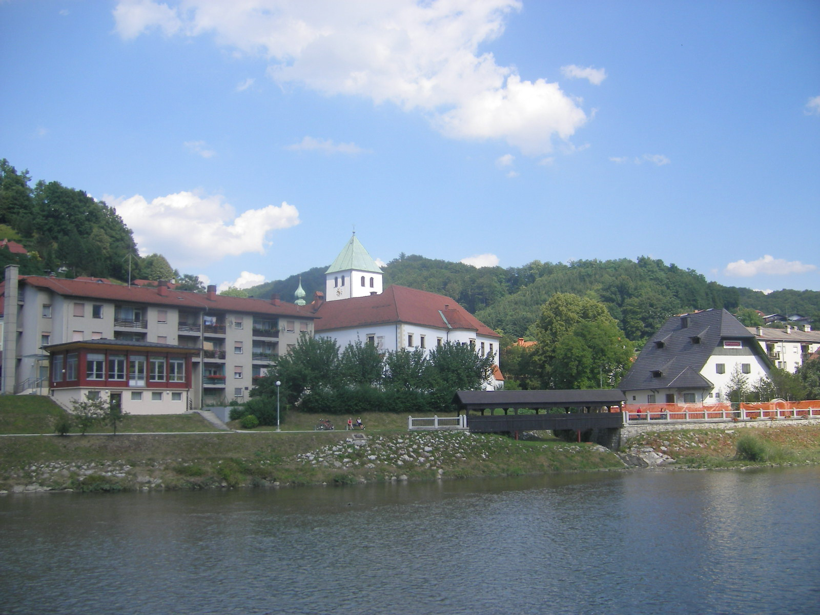 Laško